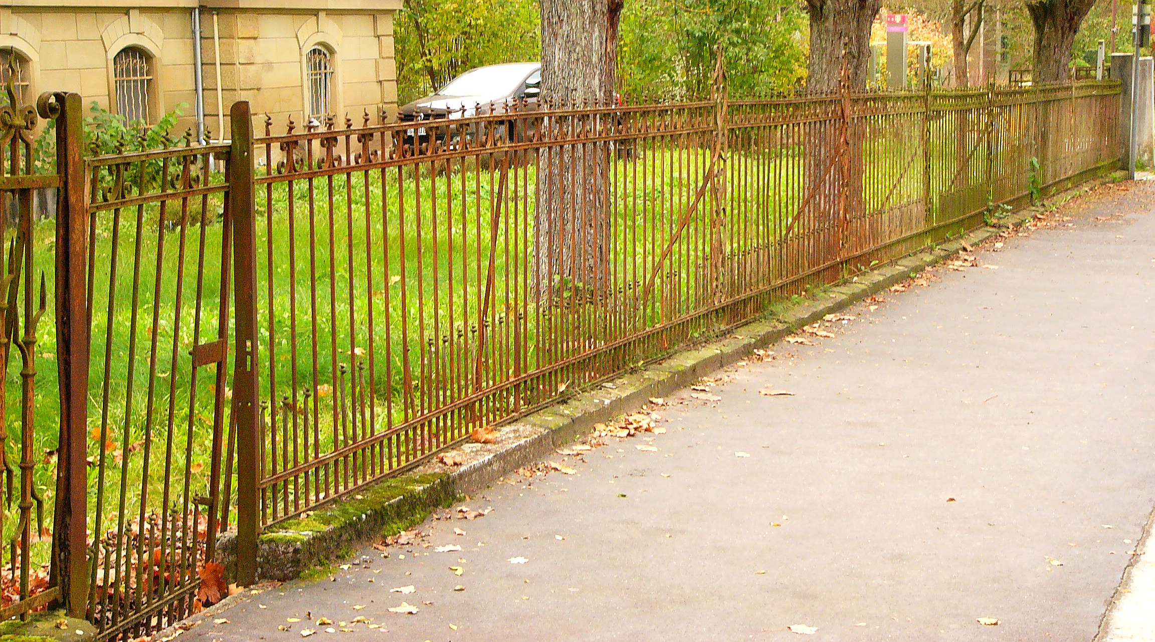 Einfriedung; Gusseisenzaun, um 1890. This is a photograph of an architectural monument.